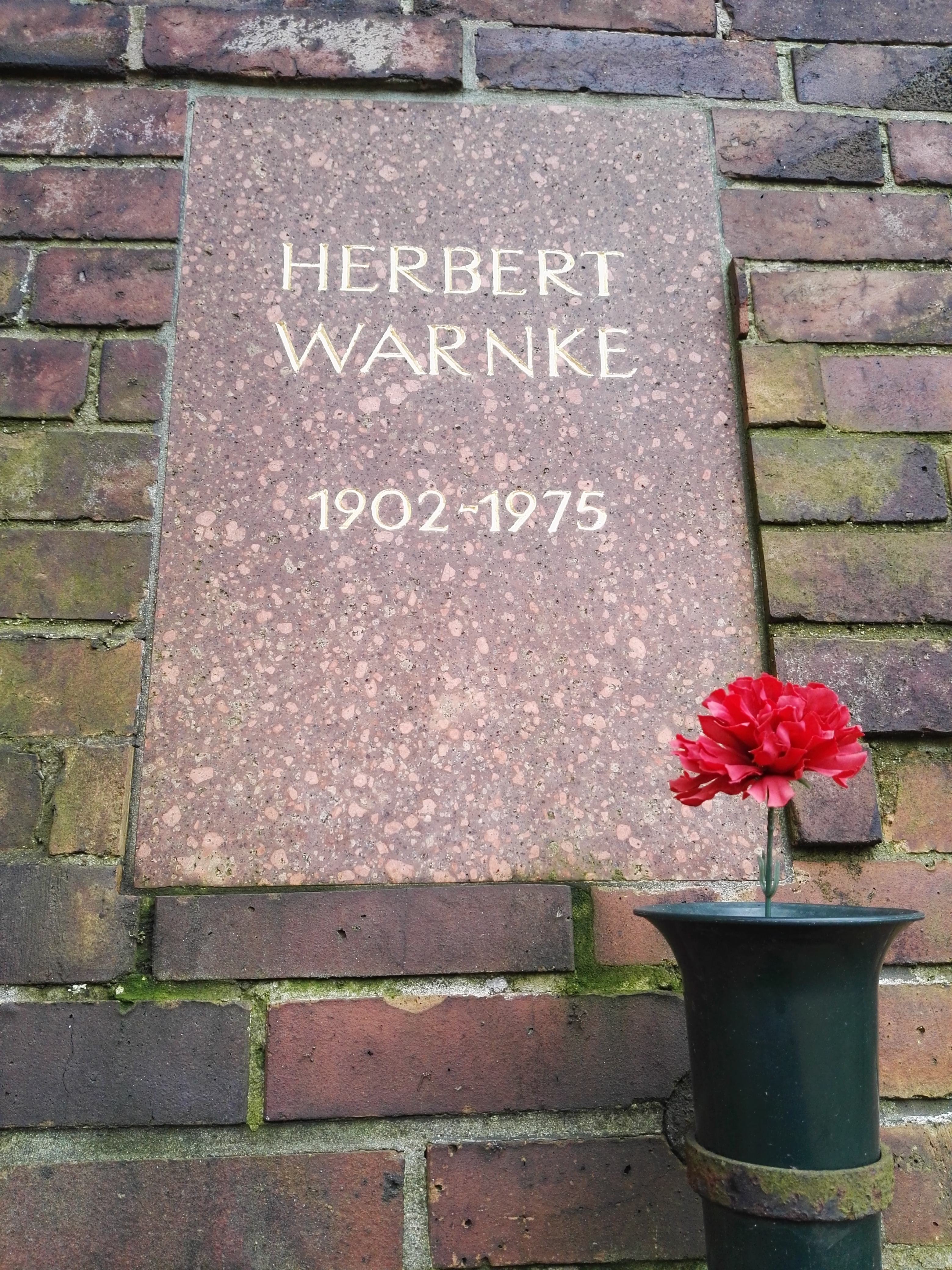 Grab von Herbert Warnke in der Gedenkstätte der Sozialisten auf dem Zentralfriedhof Friedrichsfelde in Berlin-Lichtenberg